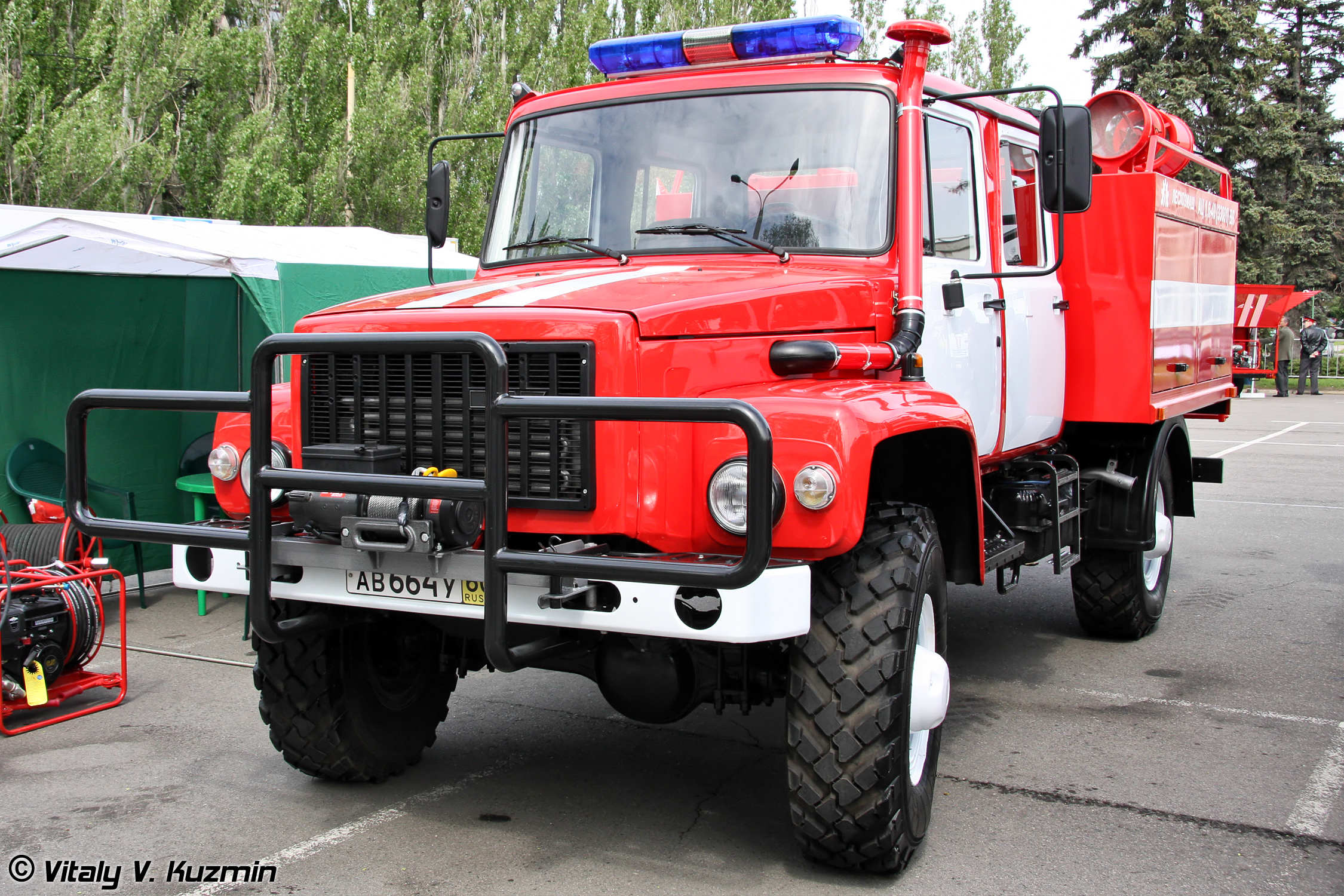 Автоцистерна пожарная АЦ-3,0-40 на шасси ГАЗ-33086 (Firefighting vehicle ATs 3,0-40 on GAZ-33086 chassis)